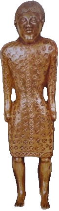 Statuette trouvée au Mans représentant un Franc. Dumbarton Oaks, Washington.